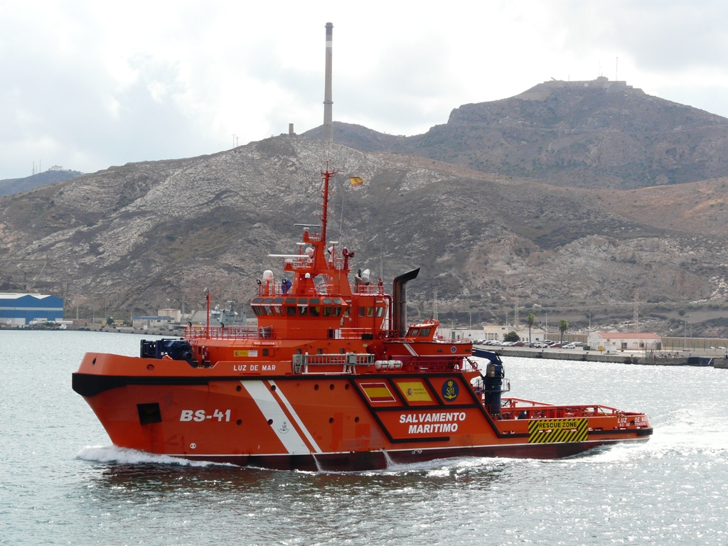 País: España - Salvamento Marítimo Clase, [Tipo]: Luz de Mar. Constructor: Astilleros Armón, Vigo, España. Dimensiones ( metros ): 56 x 15 x ? Propulsión: 2 x diesels ( 7.680 kW ), 2 x propulsores azimutales. Velocidad ( nudos ): 16,4. Autonomía ( millas ): 5.230. Dotación: 18 + 8. Capacidad de transporte: 114m3 agua, 588m3 combustible, 287m3 para almacenamiento de residuos, 62m3 espumógeno, 22m3 dispersantes. Rádar: Navegación: 1 x ARPA 25kW, 1 x ARPA 30kW. Comentario: Ex - ECOSAR Boreal. Construido en 2005.